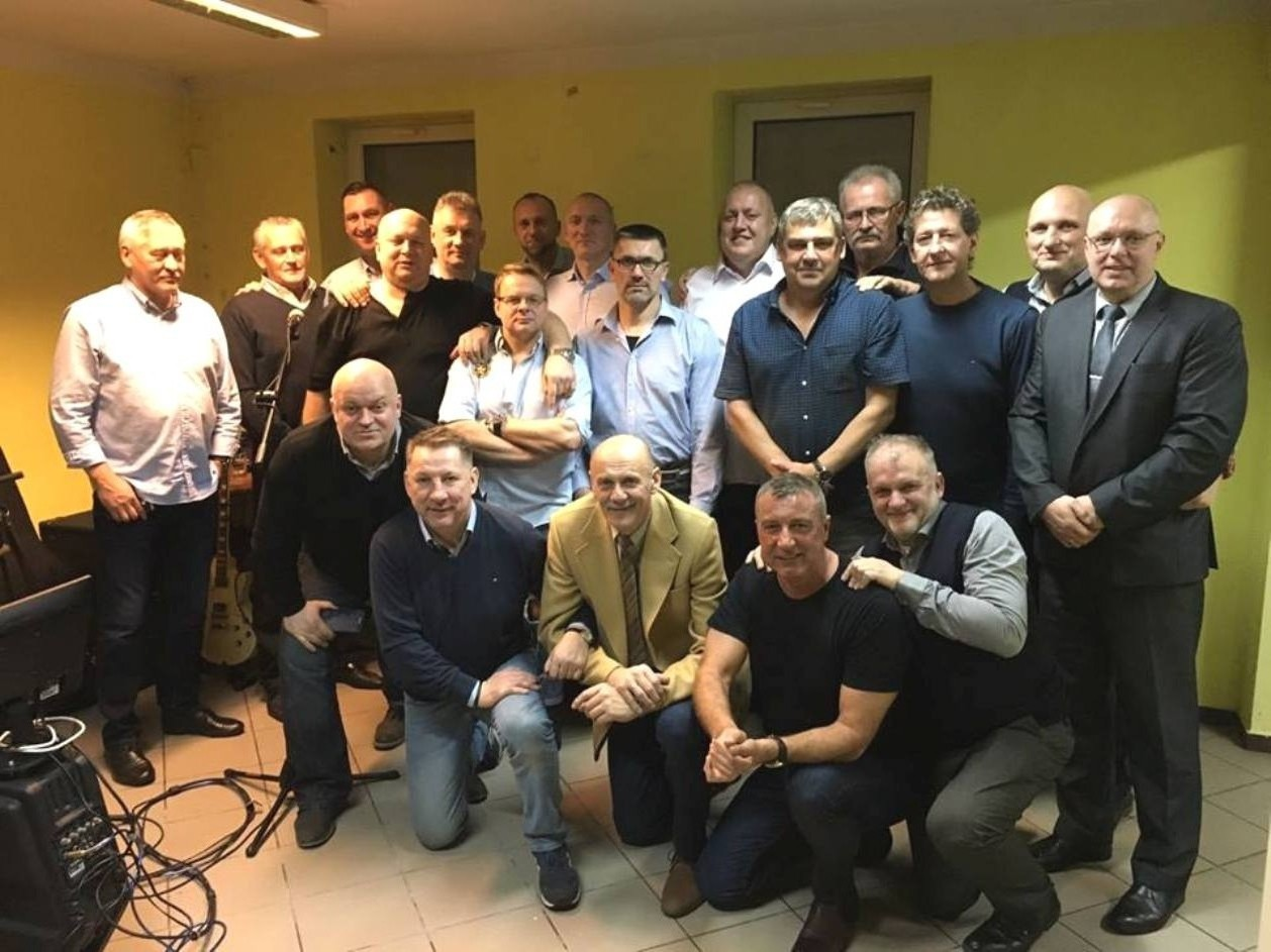 Stargard. Spotkanie byłych zawodników Spójni (21.12.2018)